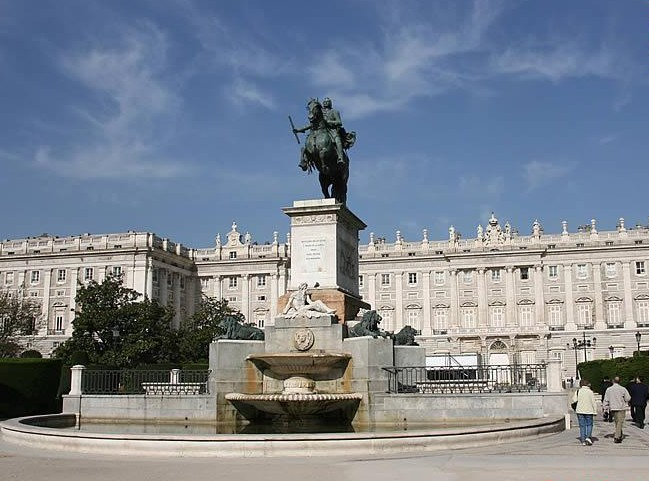 Esta es una foto de la plaza de Oriente en Madrid esta plaza es la mas famosa de España .Claudio perez 21